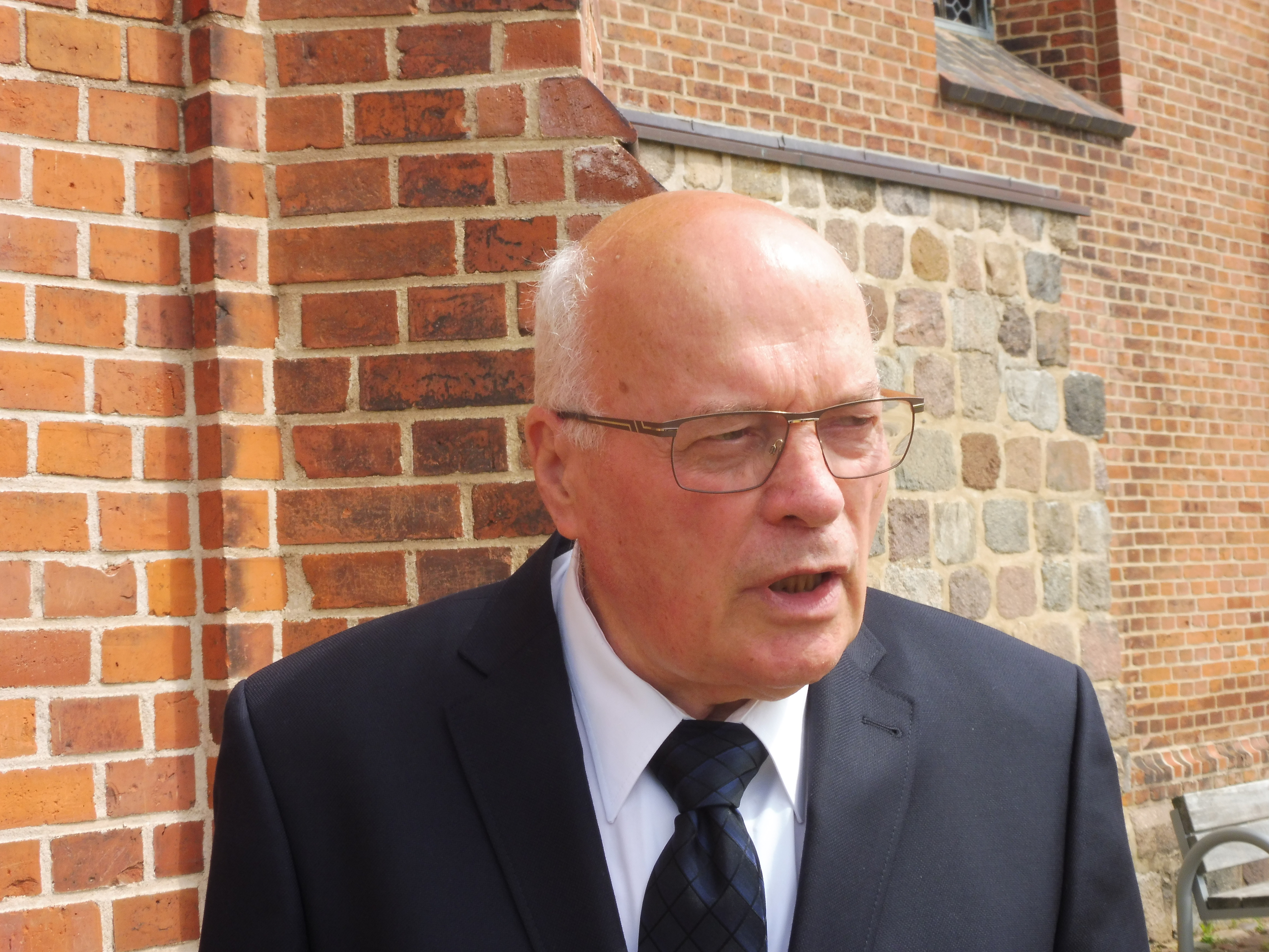 Carl-Christian Schmidt an der Priesterpforte der Plauer Marienkirche